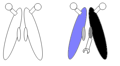 Adaptació de Schledzewski, K et al (1999): “Phylogenetic Analysis of Components of the Eukaryotic Vesicle Transport System Reveals a Common Origin of Adaptor Protein Complexes 1, 2, and 3 and the F Subcomplex of the Coatomer COPI”, Journal of molecular evolution, núm 48, 14/1/1999, 770–778.